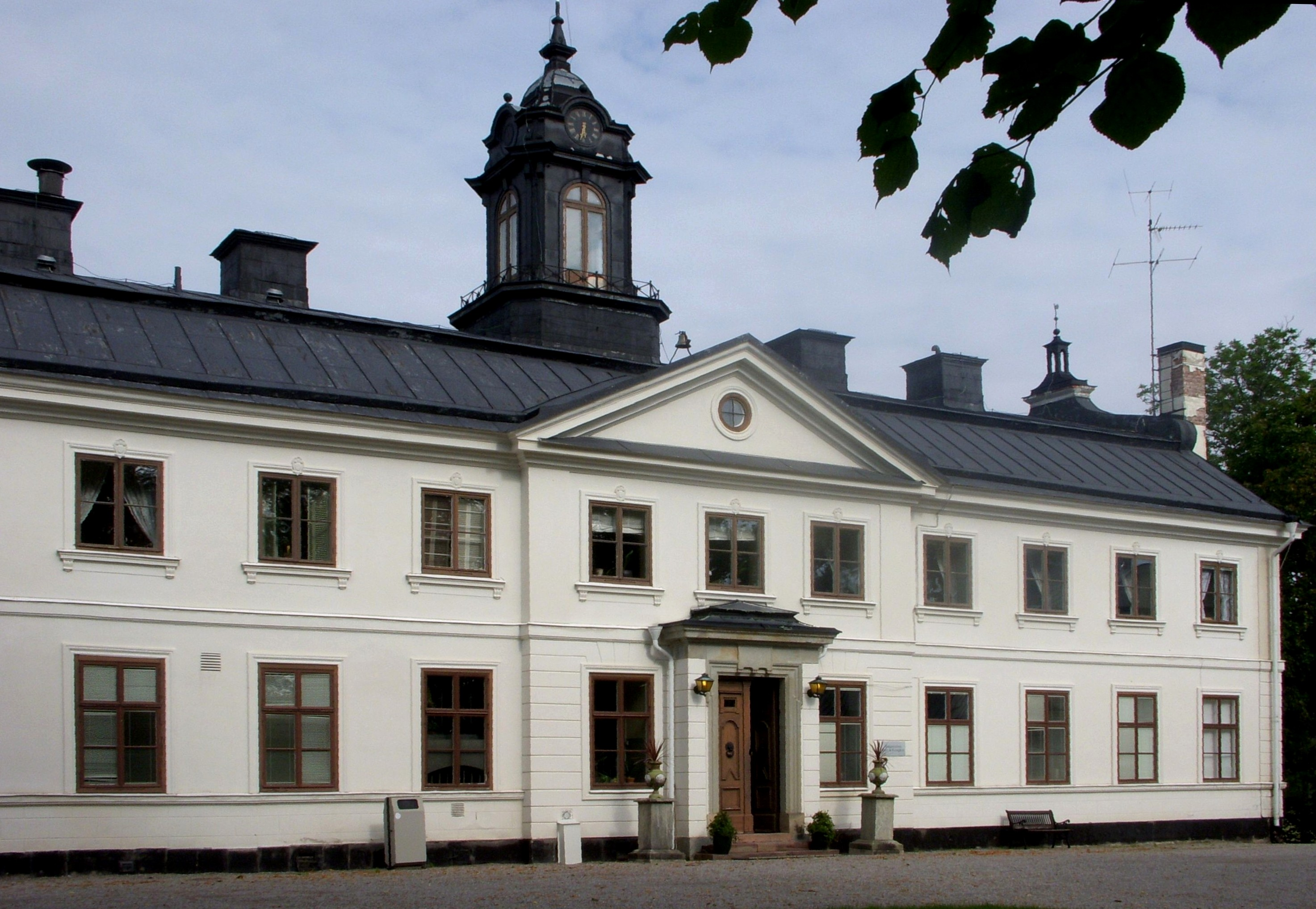 Kaggeholm, på Helgö, Ekerö kommun ägare Sisyfosgruppen